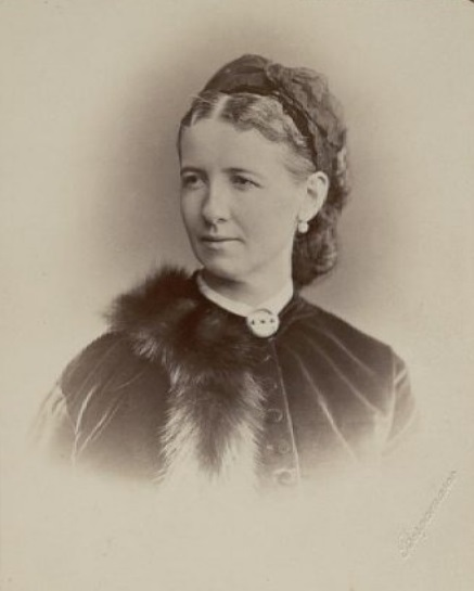 Баронесса Анна Карловна Пилар фон Пильхау (1832—1885)